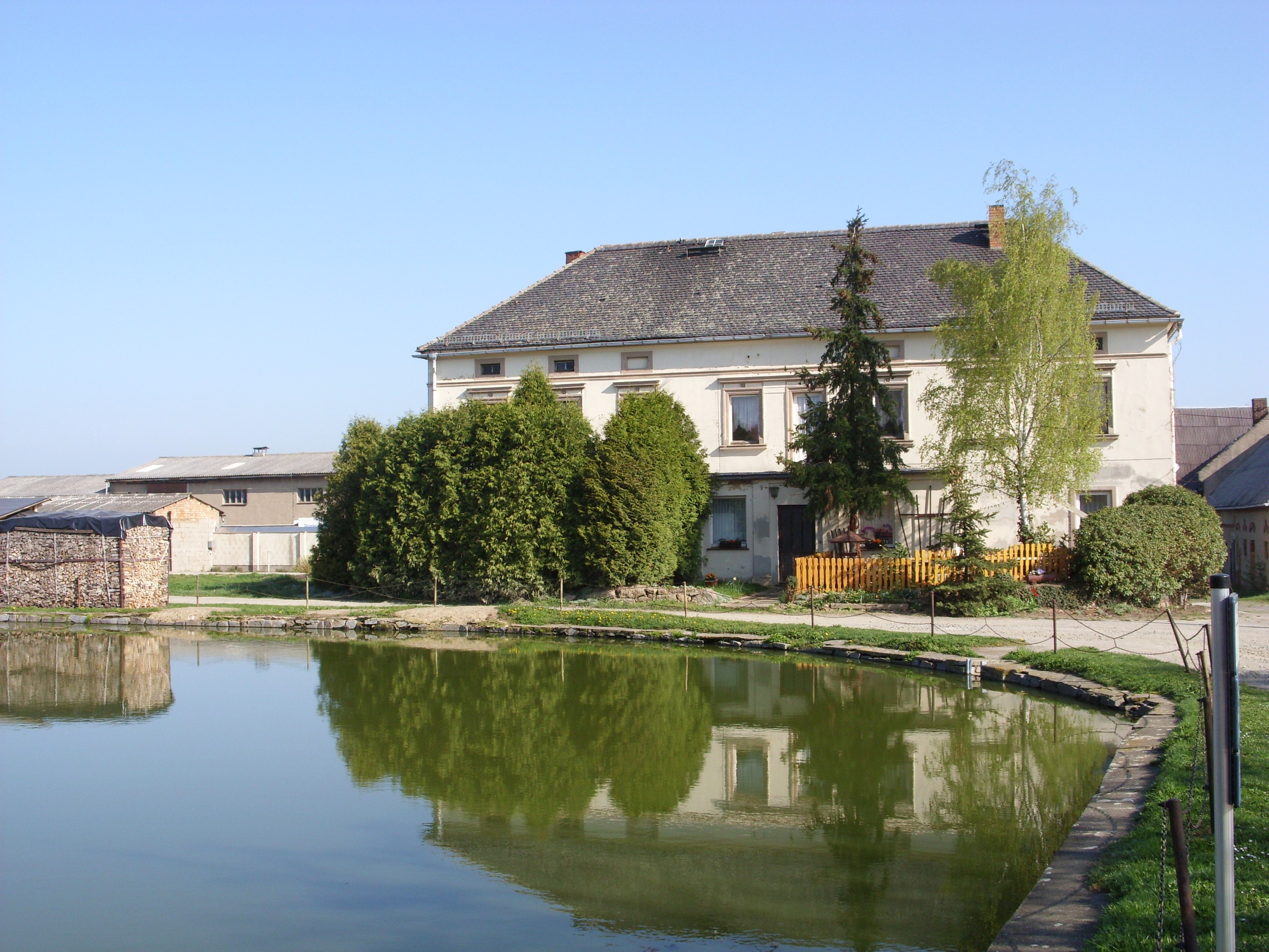 Ehemaliges Herrenhaus in Guhra, Landkreis Bautzen. Hornjoserbsce: Dom knježka na Horje, gmejna Bóšicy, wokrjes Budyšin.